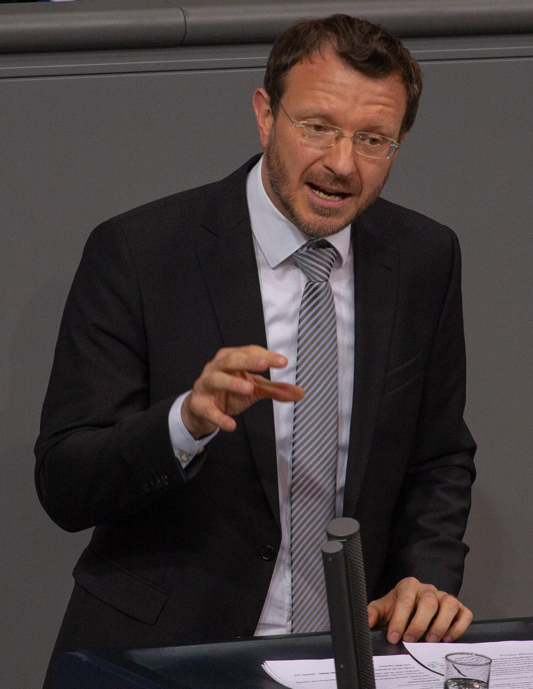 Jan-Marco Luczak, Mitglied des Deutschen Bundestages, während einer Plenarsitzung am 11. April 2019 in Berlin.